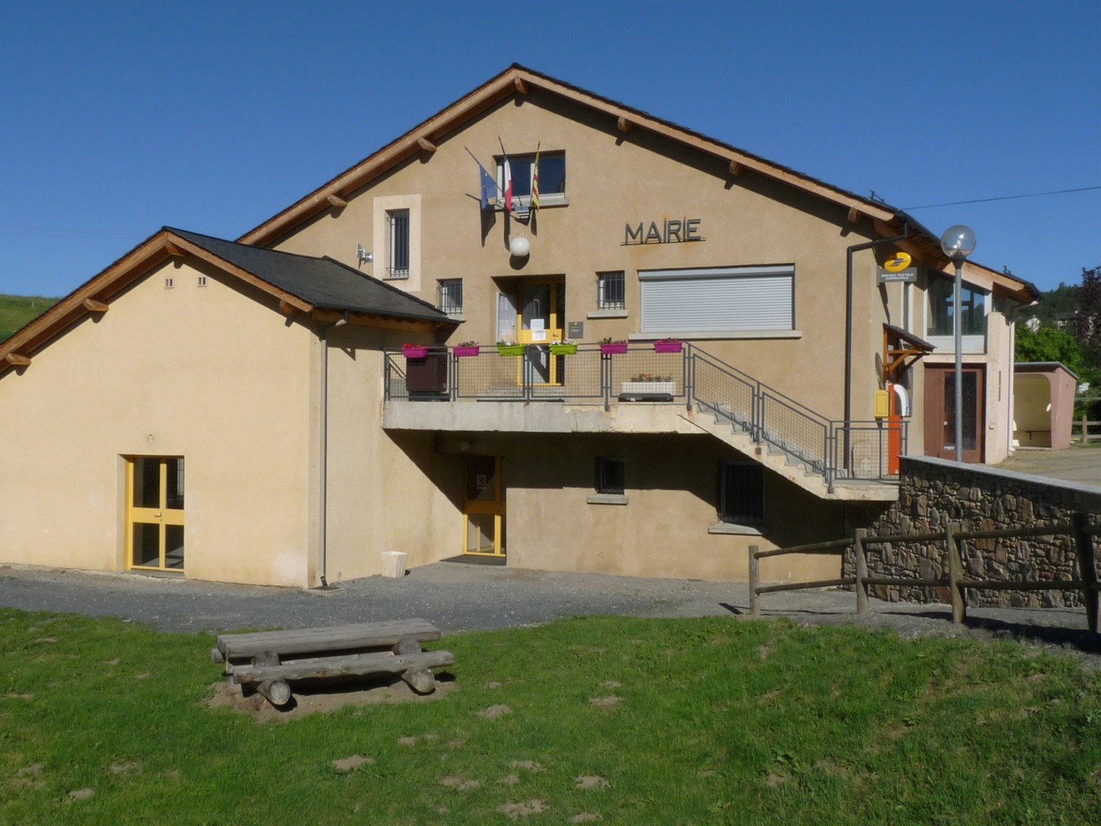 Mairie de La Llagonne, Pyrénées-Orientales, France